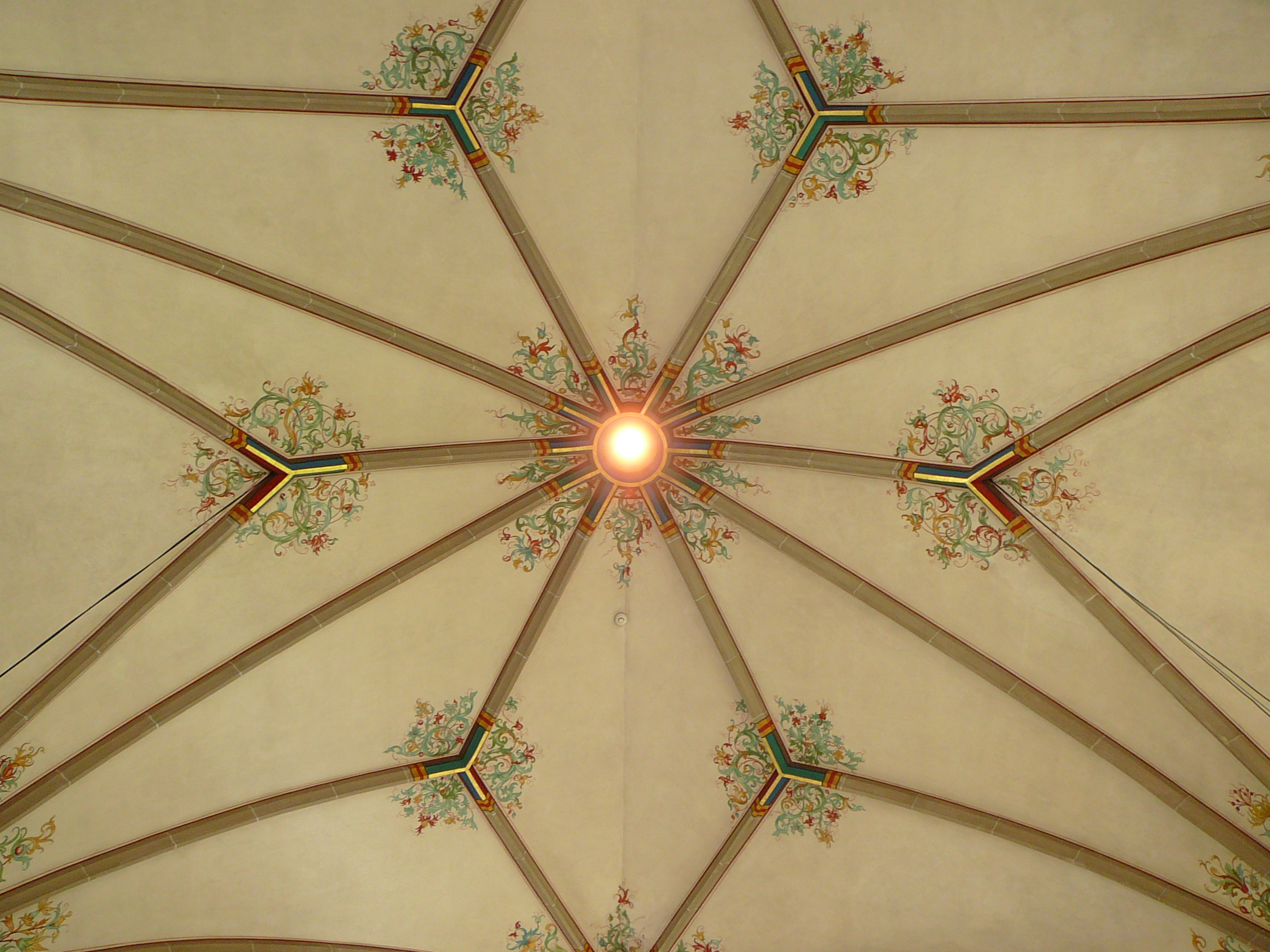 Dreifaltigkeitskirche Bülach Blick, Decke